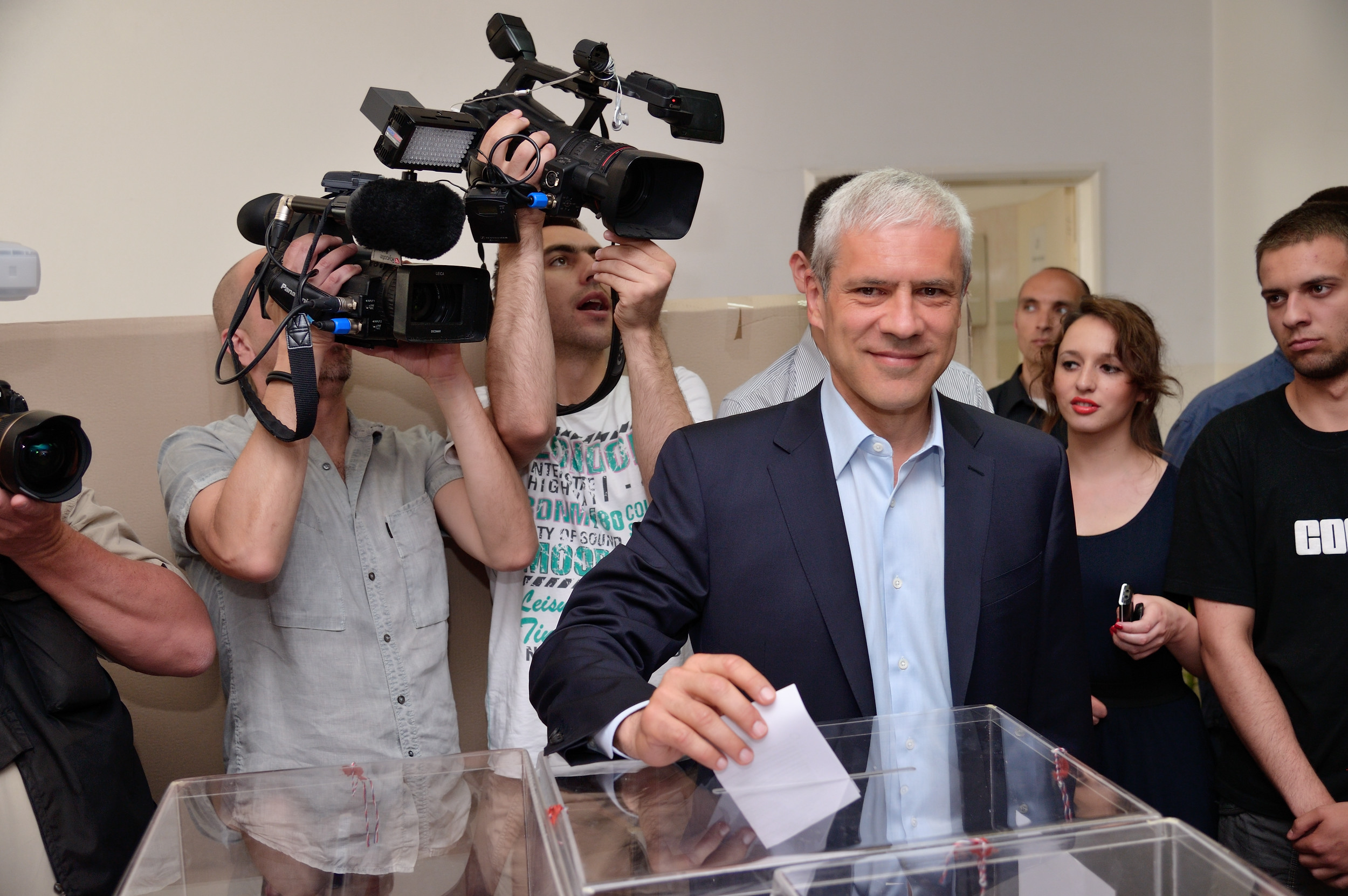 Kandidat za predsednika Srbije i predsednik Demokratske stranke Boris Tadić prilikom glasanja na svom biračkom mestu. (6. maj 2012); Foto servis DS